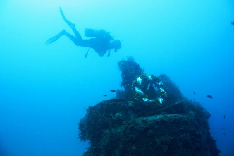 צולל מניח זר פרחים לכבוד הרוגי השייטת העשירית בצוללת שירה במפרץ חיפה.